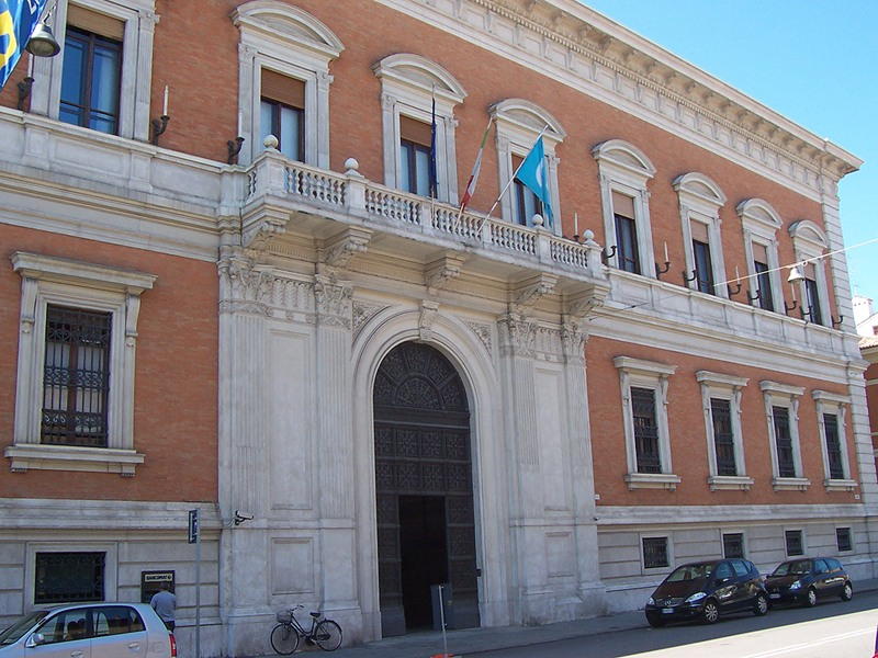 Ferrara - Palazzo della Cassa di Risparmio